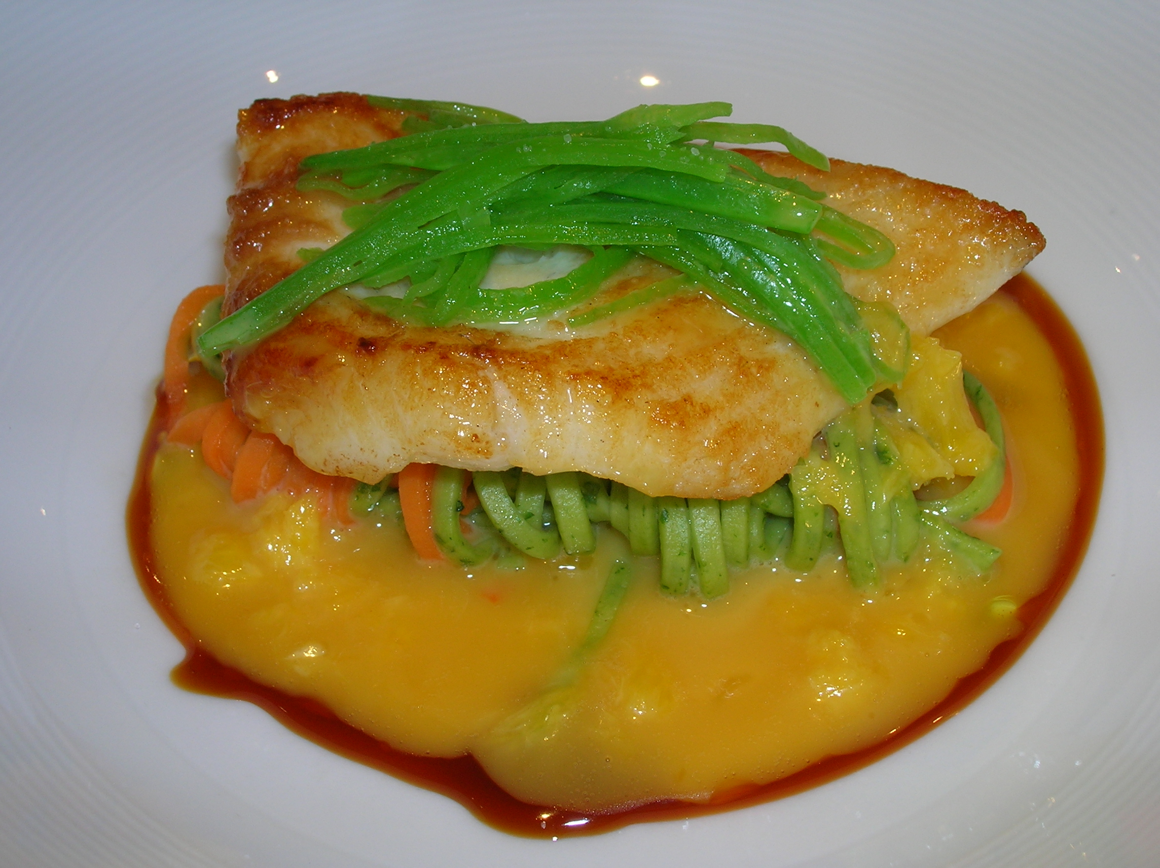 פילה דג פוטית מונח על מצע טליאטלה במסעדת גורדון רמזי